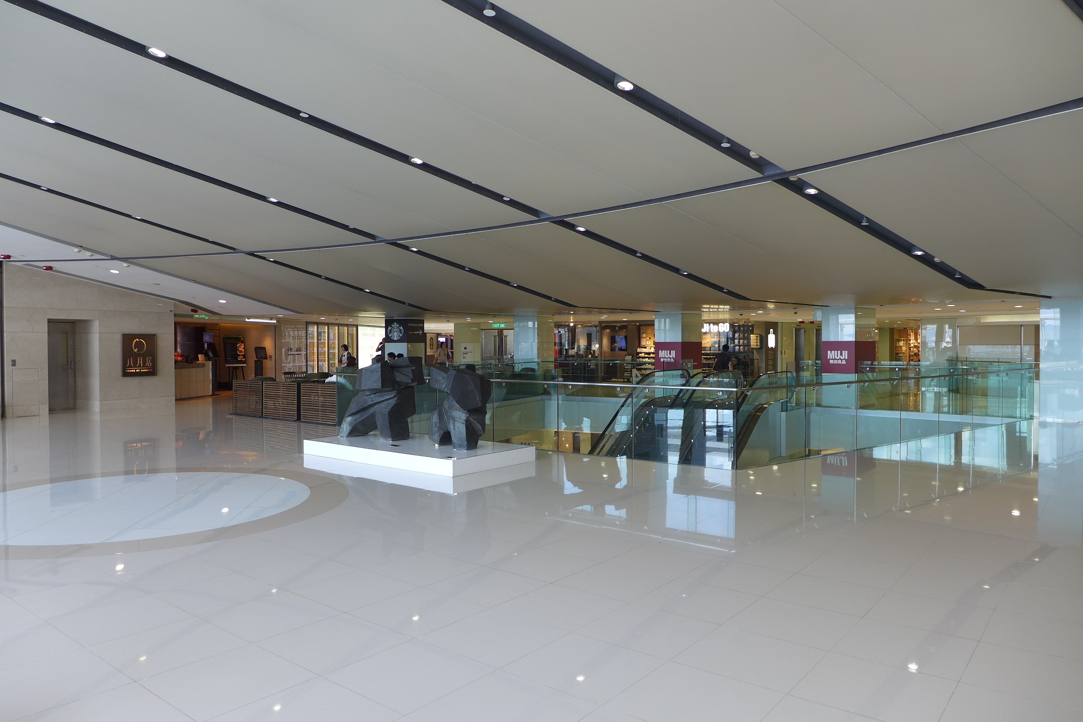 Ocean Centre Level 4